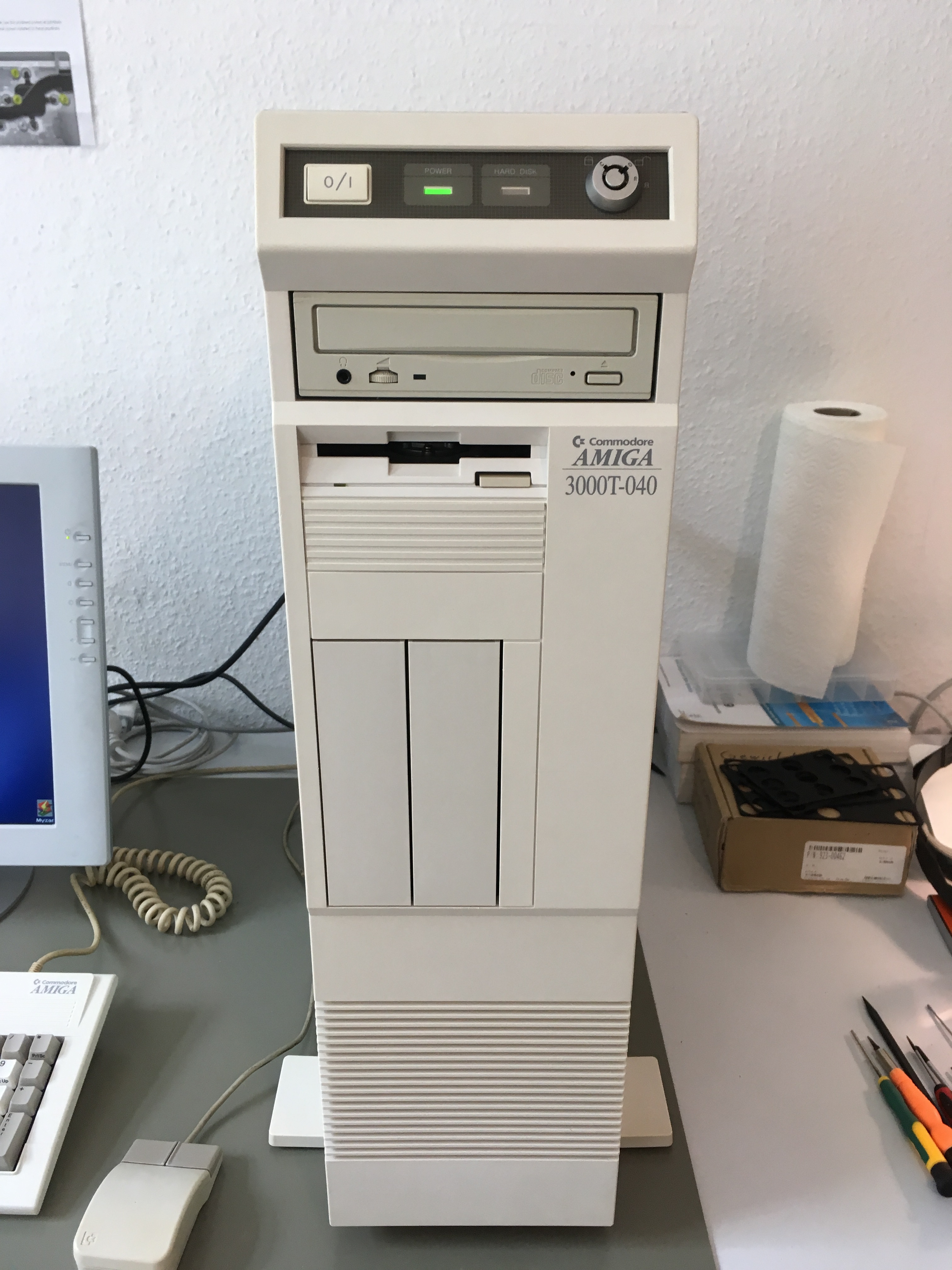 Commodore Amiga 3000T-040